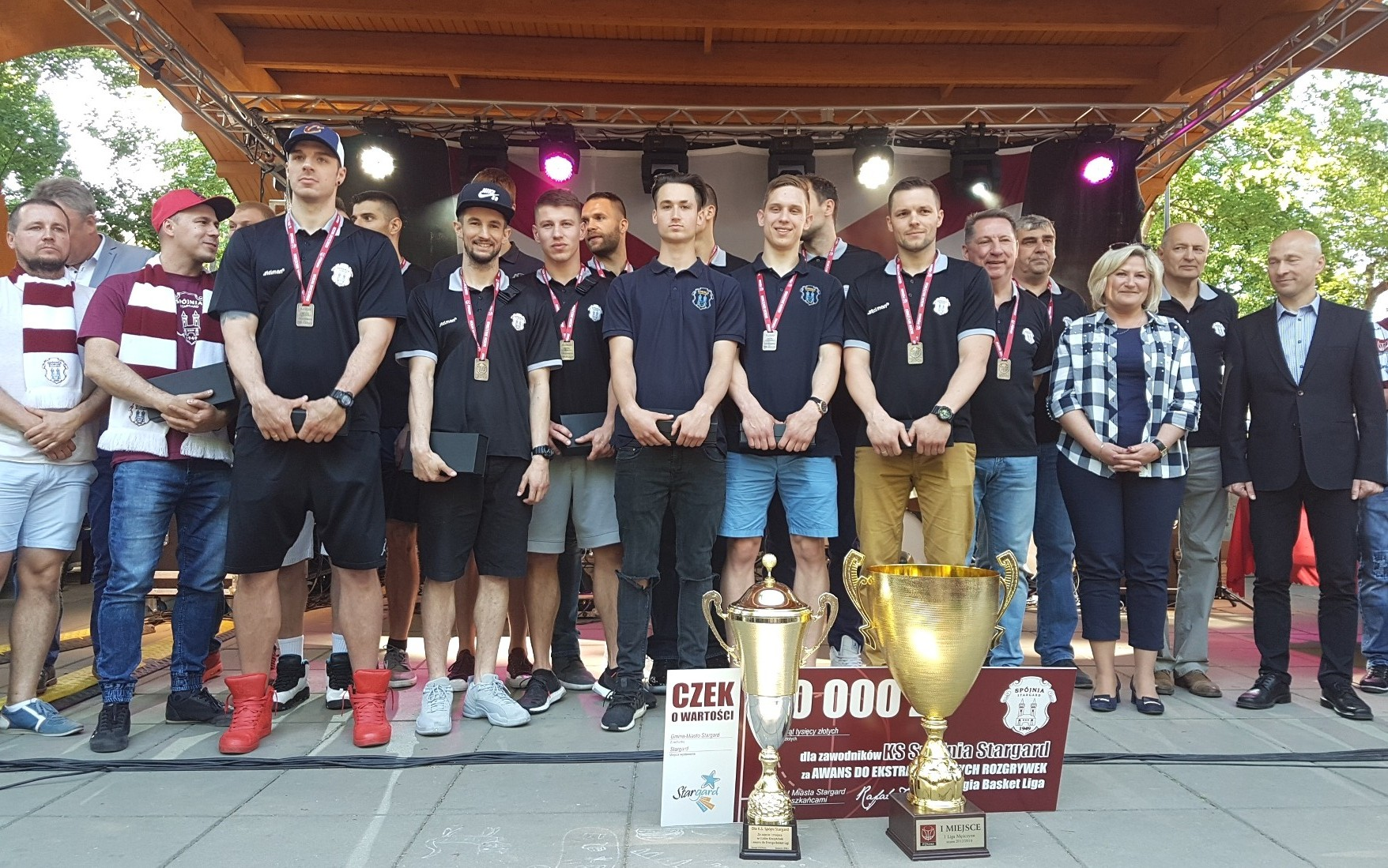 Spójnia z pucharem, awansem (19.05.2018)